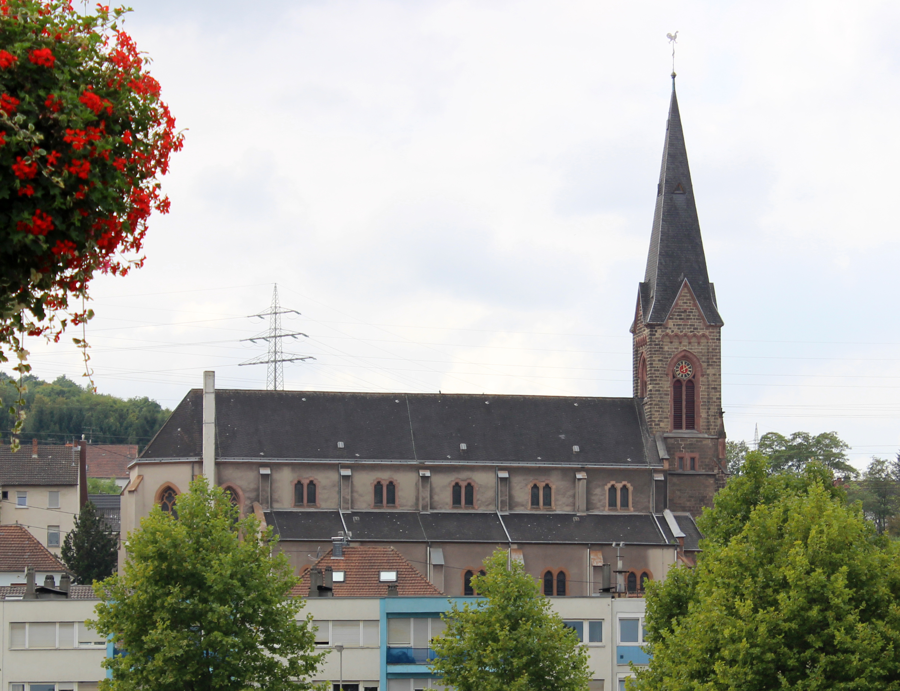 Die katholische Pfarrkirche St. Josef in Wehrden, einem Stadtteil von Völklingen, Saarland